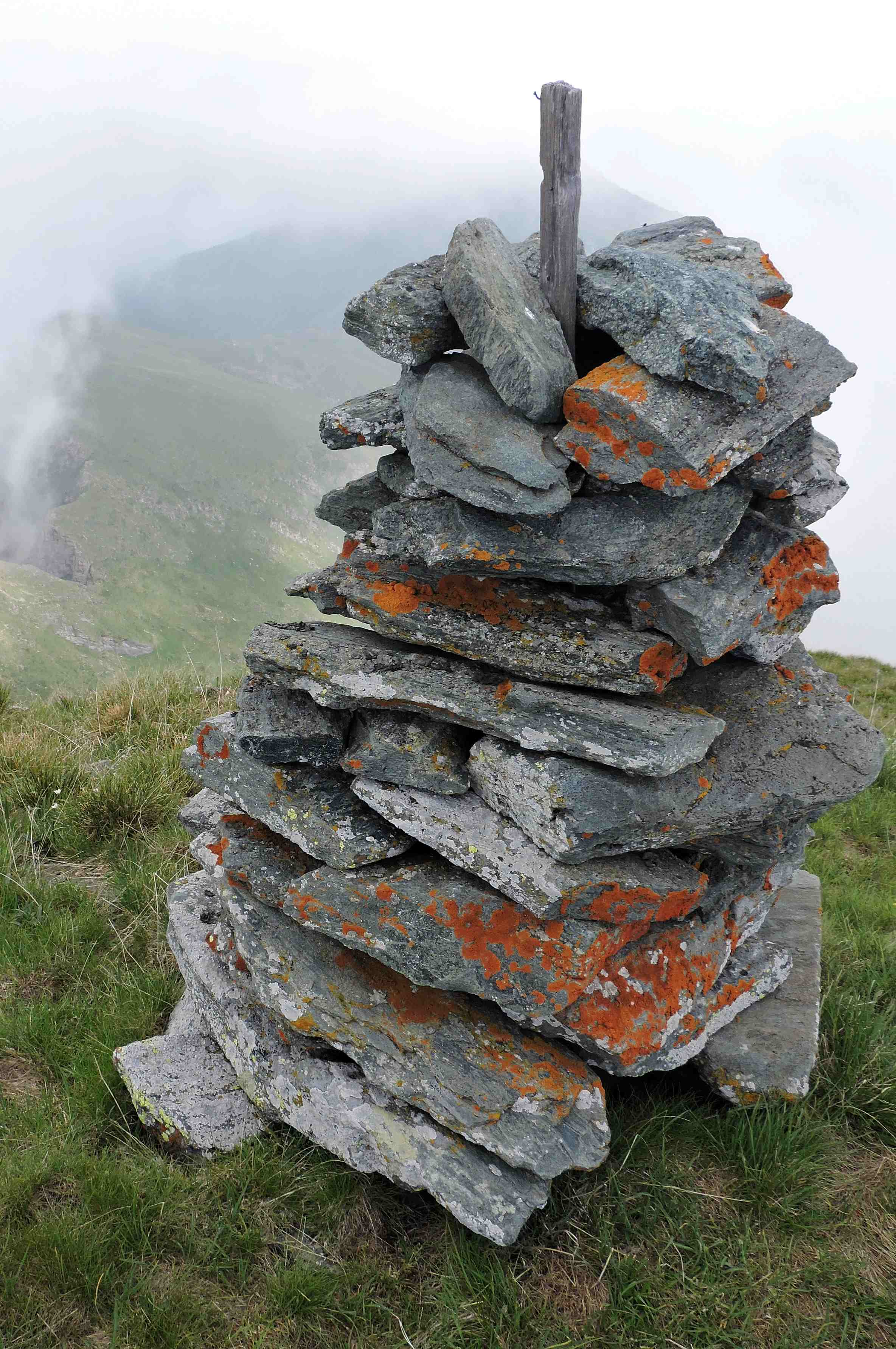 Rocca Maritano (Alpi Graie): l'ometto sommitale